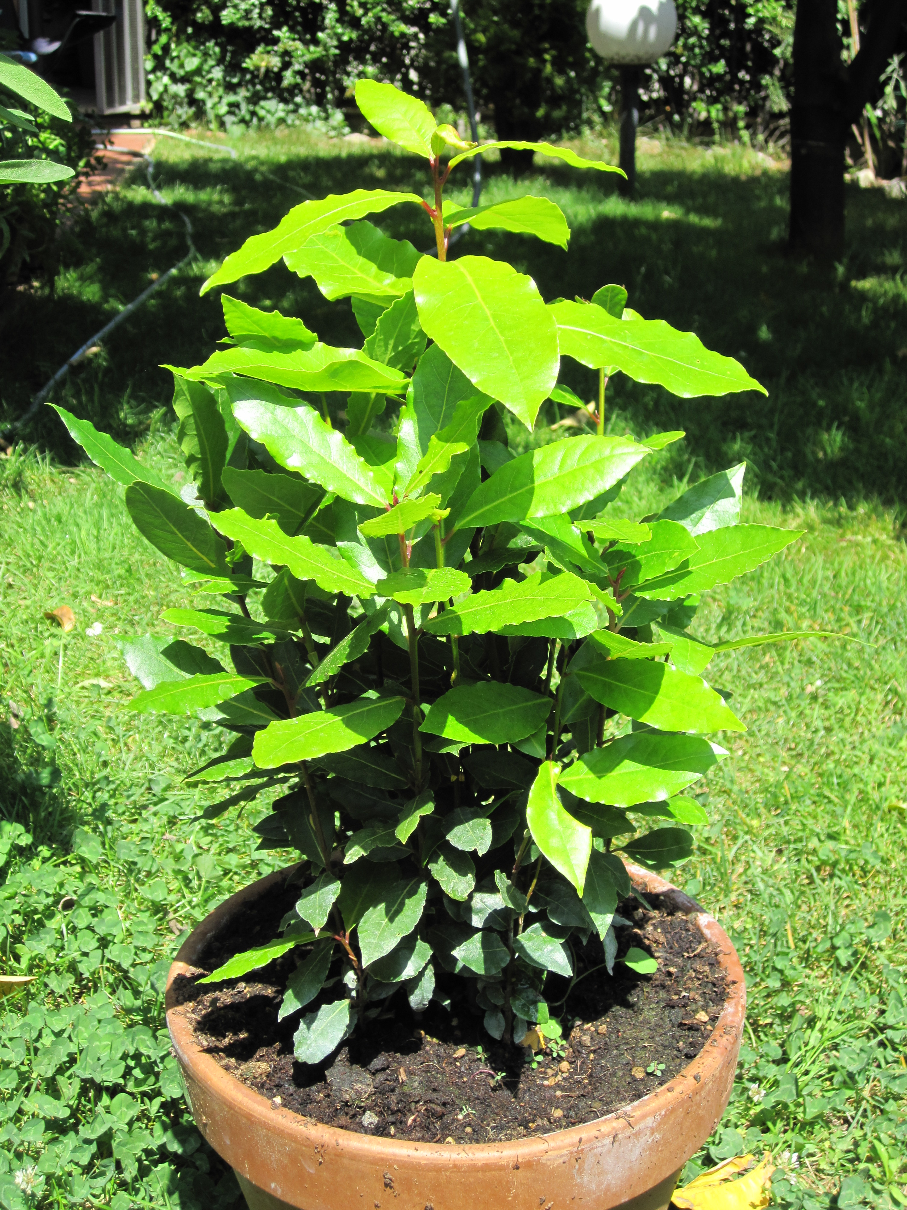 Una pianta di alloro in vaso